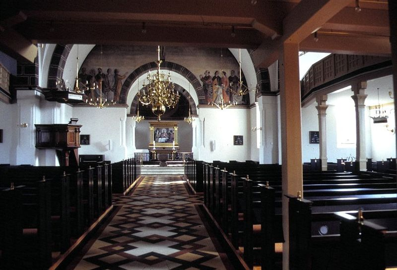 Esbjerg Vor Frelser Kirke i Danmark. Skibet set mod øst